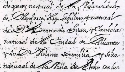 Proceso Original de las Pruebas de Nobleza, Vida y Costumbres de D. Jorge Juan y Santacilia, para su ingreso en la Orden de Malta. Documento expuesto en el museo de historia de Monforte del Cid. Cuyo original perteneciente al Archivo Histórico Nacional